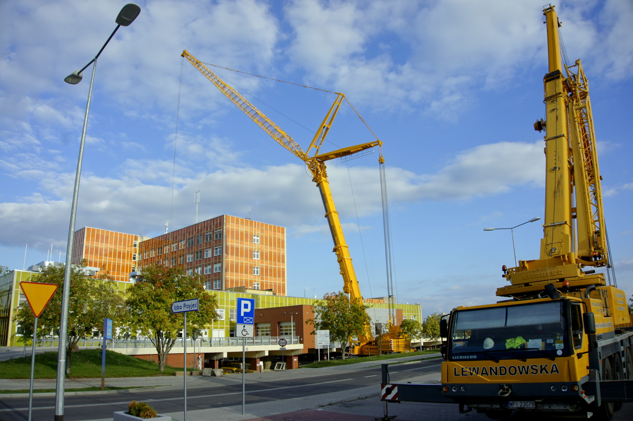 Szpital Wojewódzki w Gorzowie Wlkp., wrzesień 2015 r. Samojezdne żurawie Liebherr podczas pracy przy rozbudowie szpitalnego bloku operacyjnego ( transport modułów bloku nad budynkami ). Żuraw główny to Liebherr LTM 1500-8.1